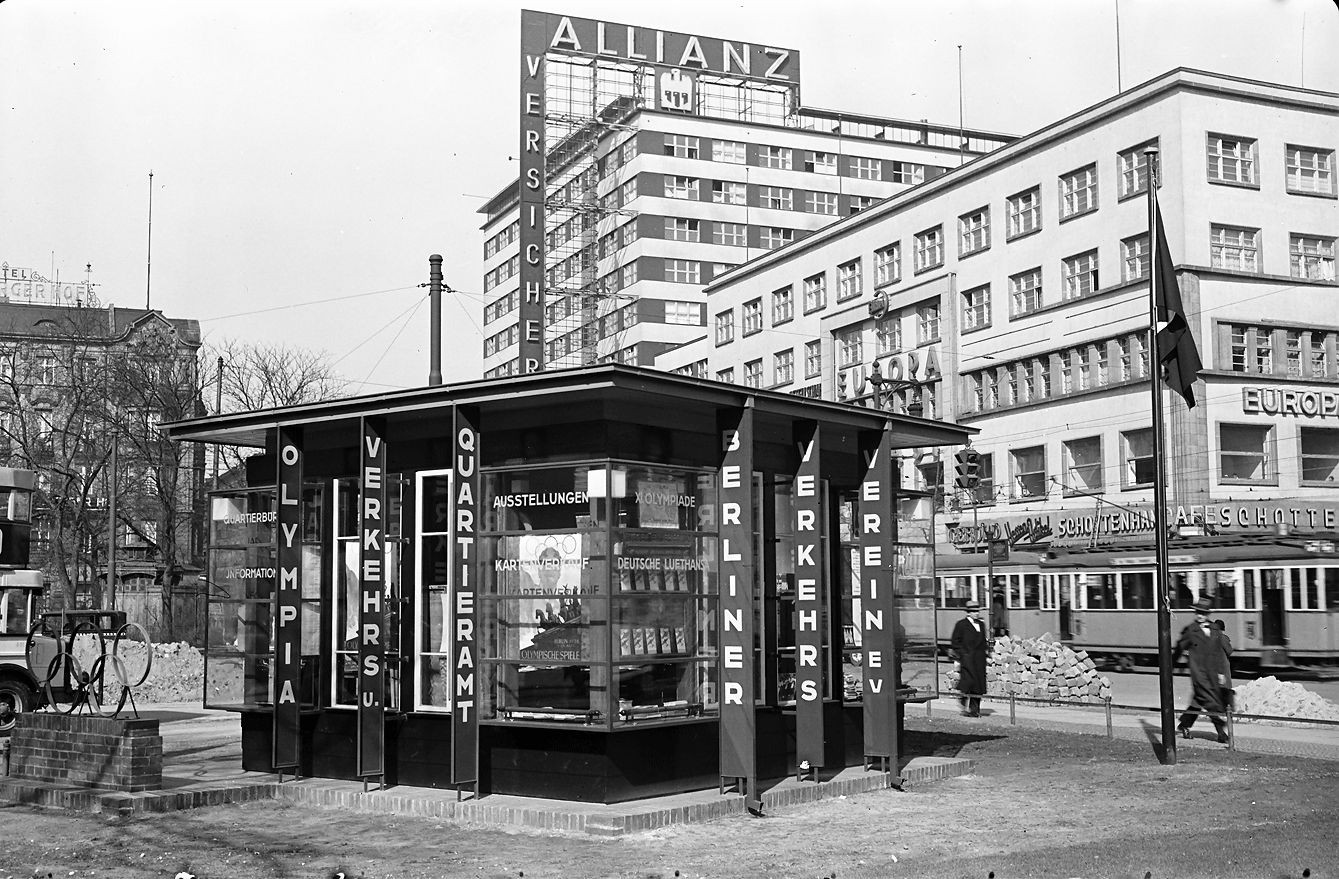 Olympia-Pavillon auf dem Askanischen Platz in Berlin.